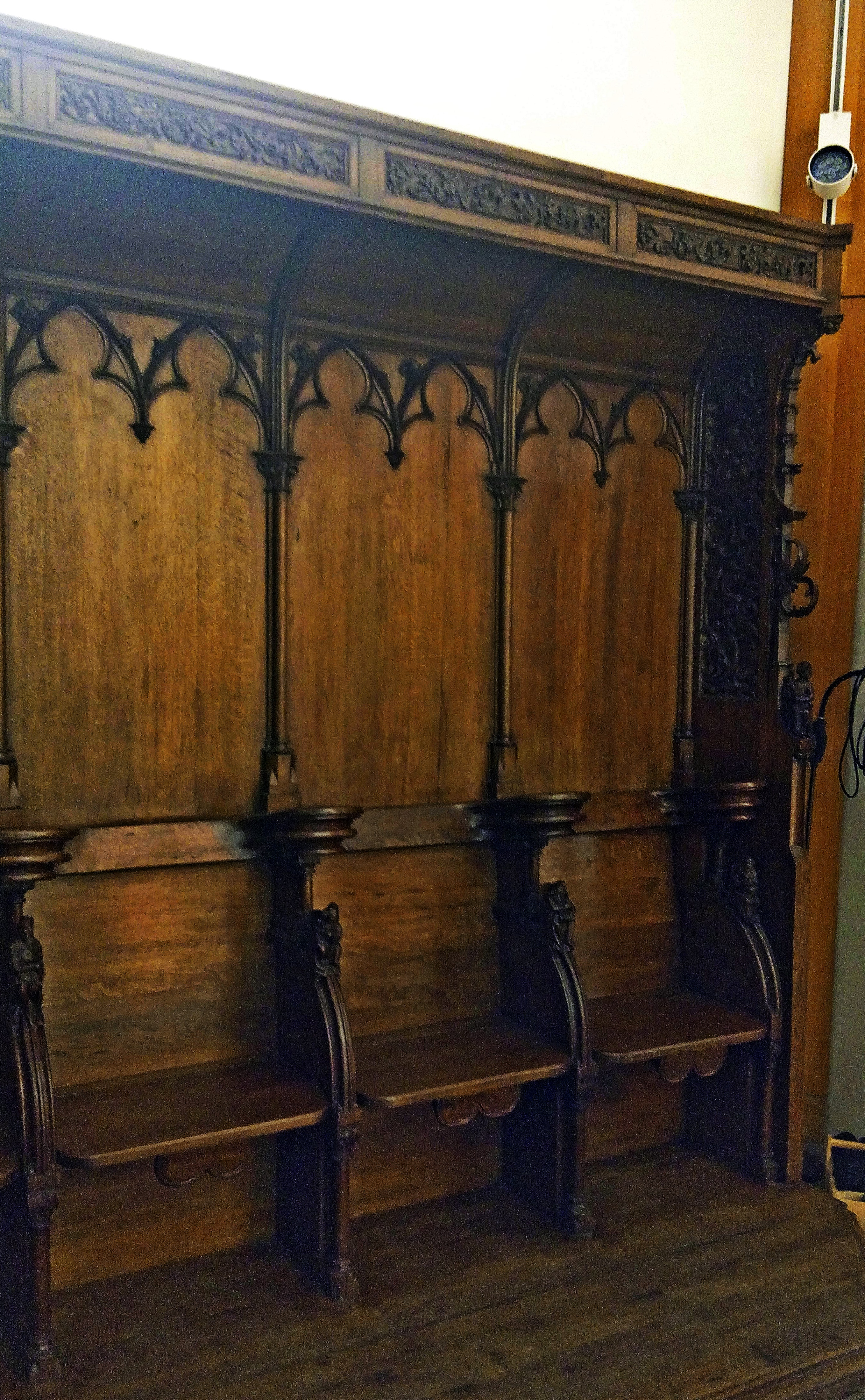 Stiftskirche Neustadt, Rest des spätgotischen Chorgestühls, um 1500